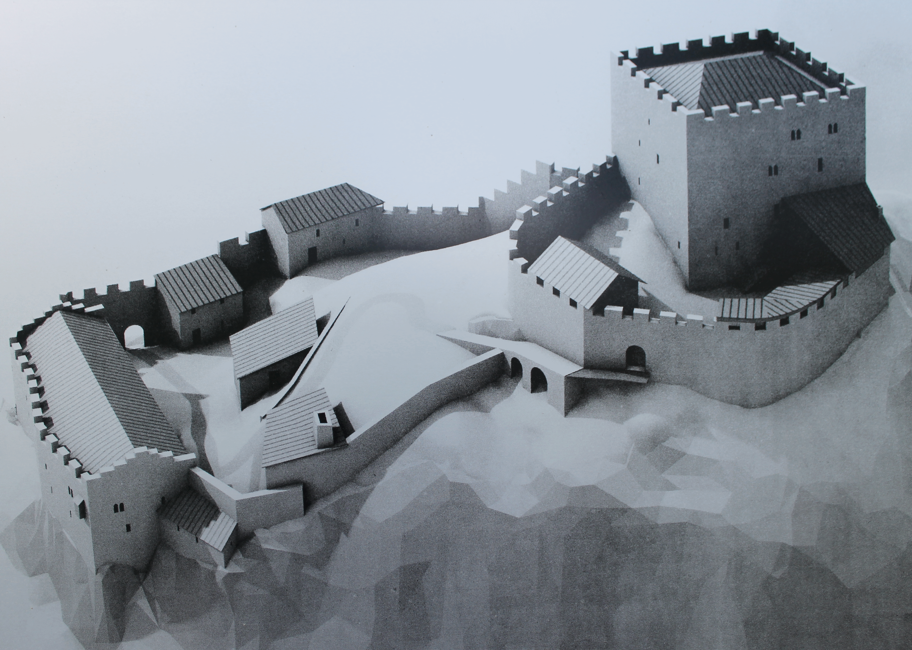 Burgruine Wartenstein Rekonstruktion (Von Schautafel an der Ruine)